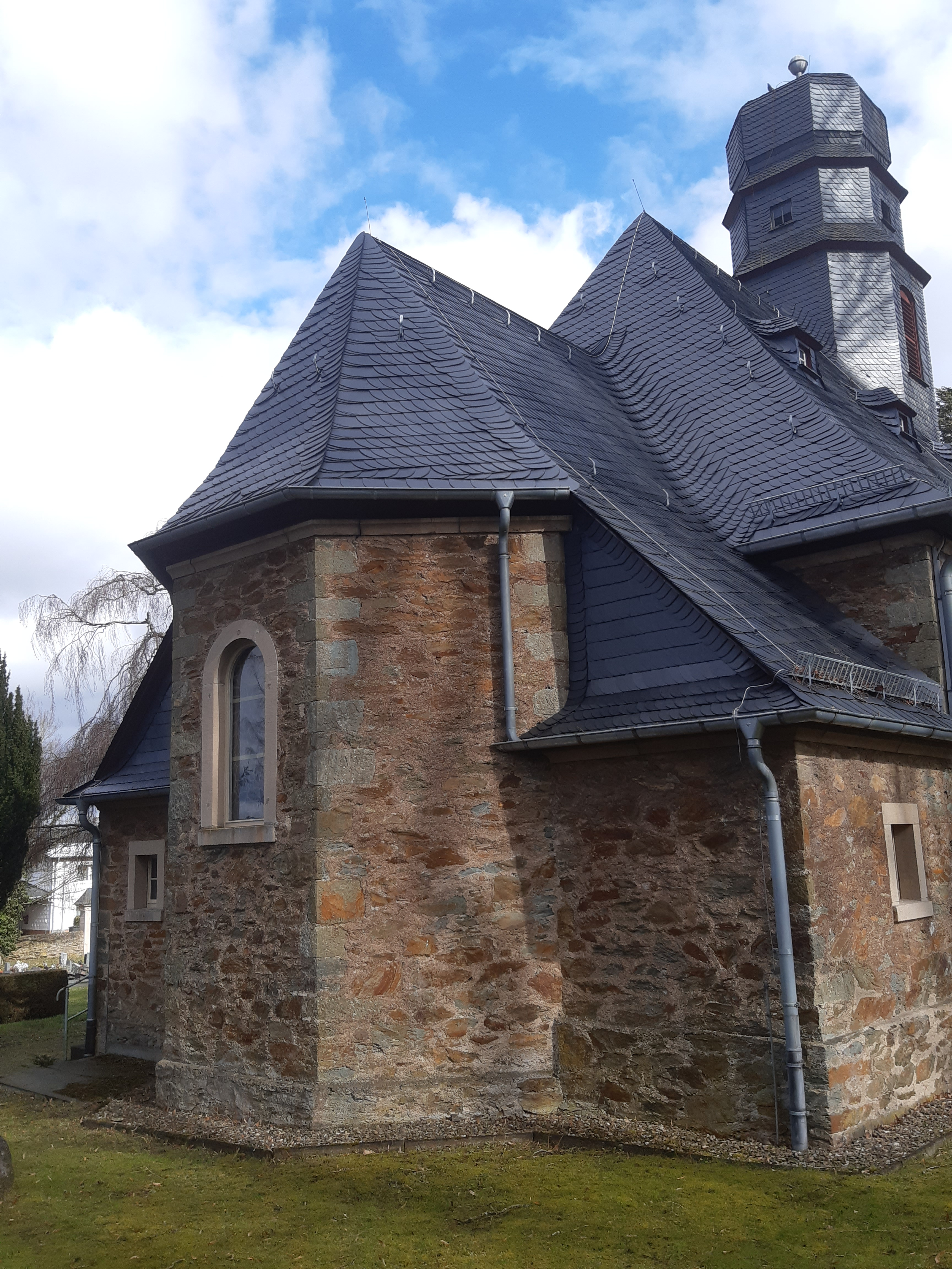 Evangelische Kirche Albshausen (Solms), Lahn-Dill-Kreis, Hessen, Deutschland